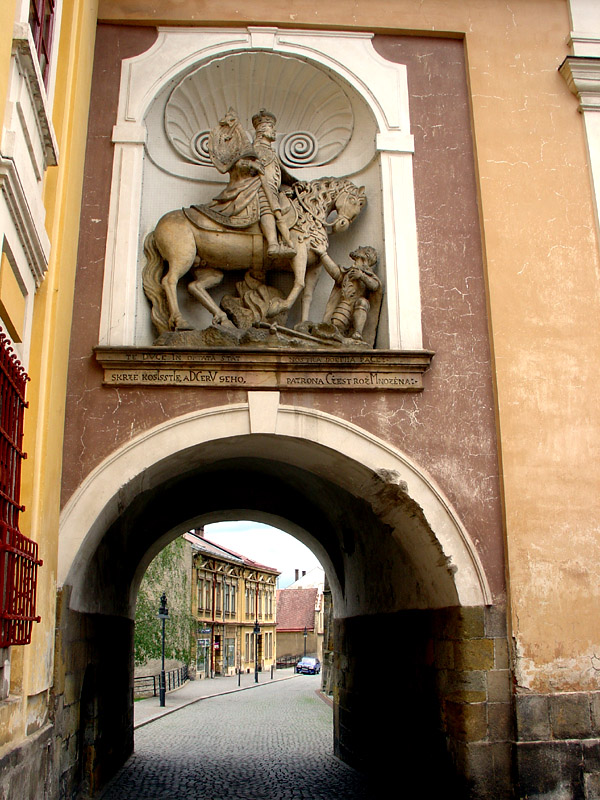 Brána z náměstí směrem na Jakubské předměstí Socha svatého Václava umístěná na kostele sv. Mikuláše v Jaroměři, ČR Czech republic, Europe Author=Karelj